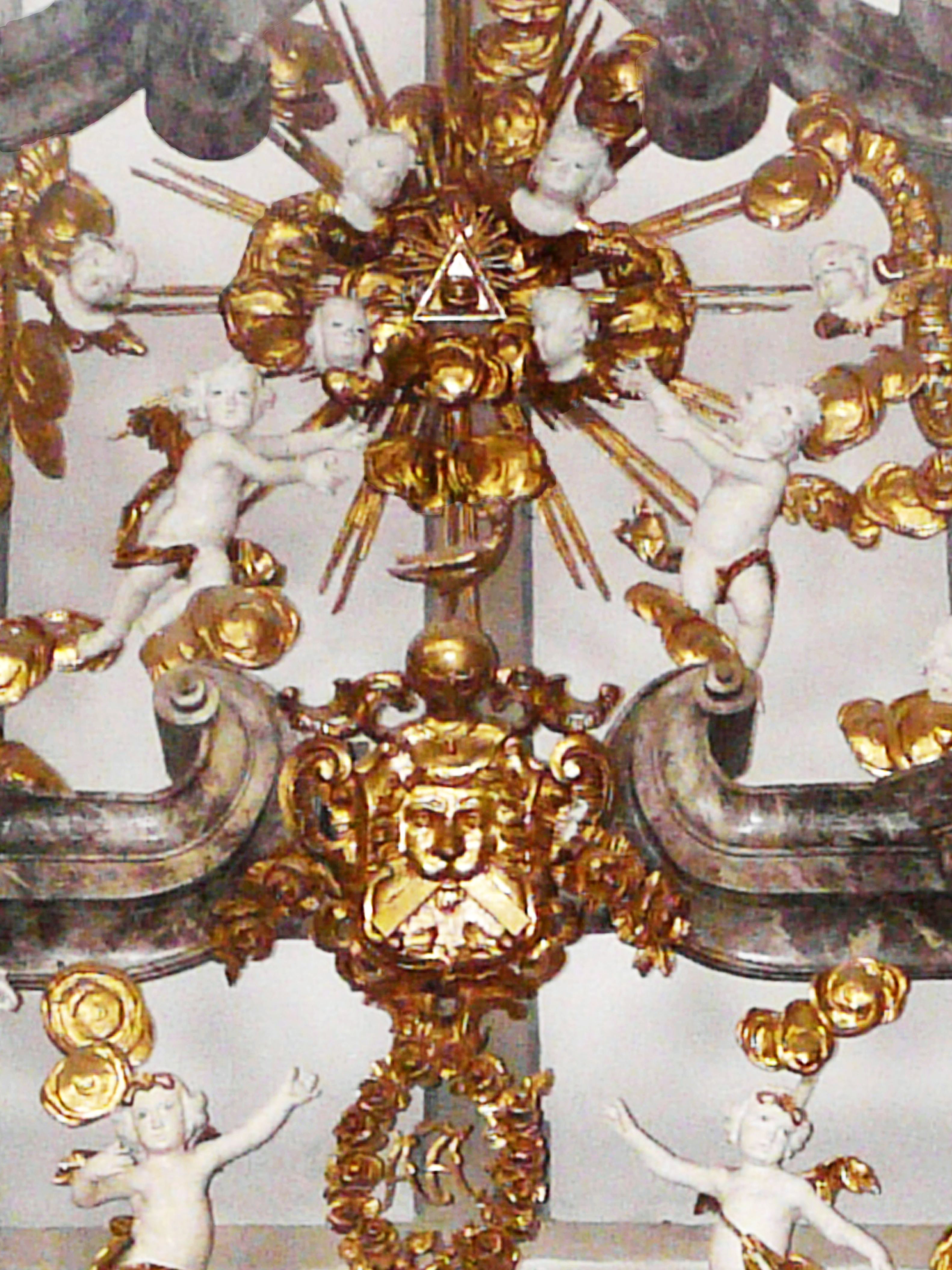 Фрагмент алтаря Св. Анны